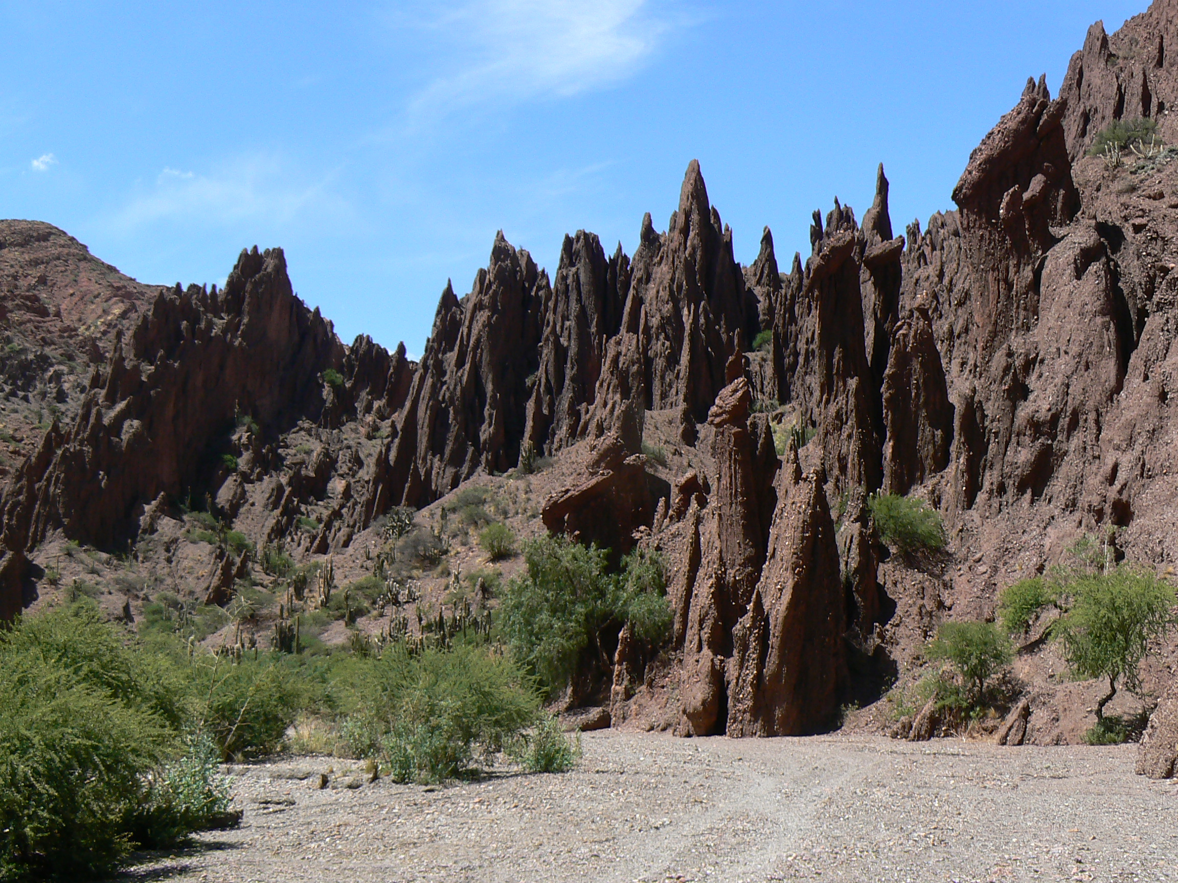 Runa Simi: Qhari Wayq'u, P'utuqsi suyu.